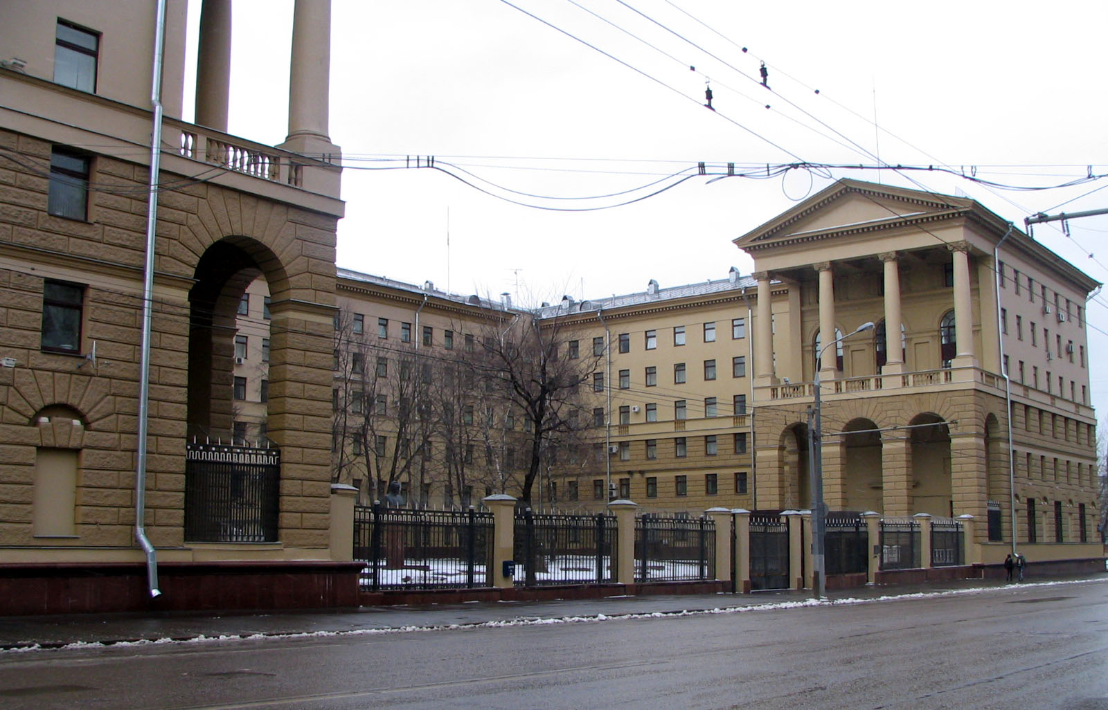 Petrovka Street, 38. Moscow